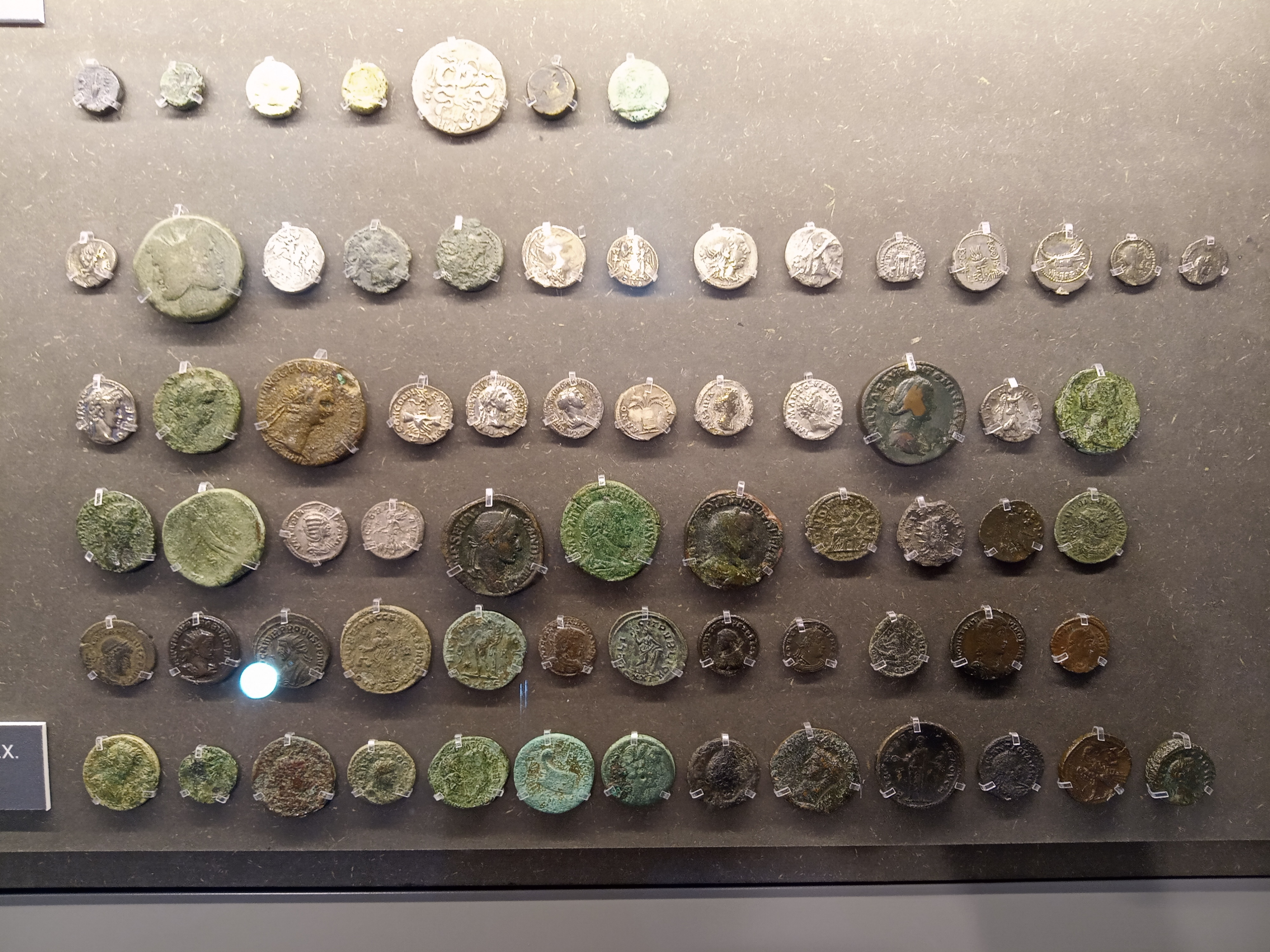 Археологічний музей Керкіри, греція, острів Керкіра